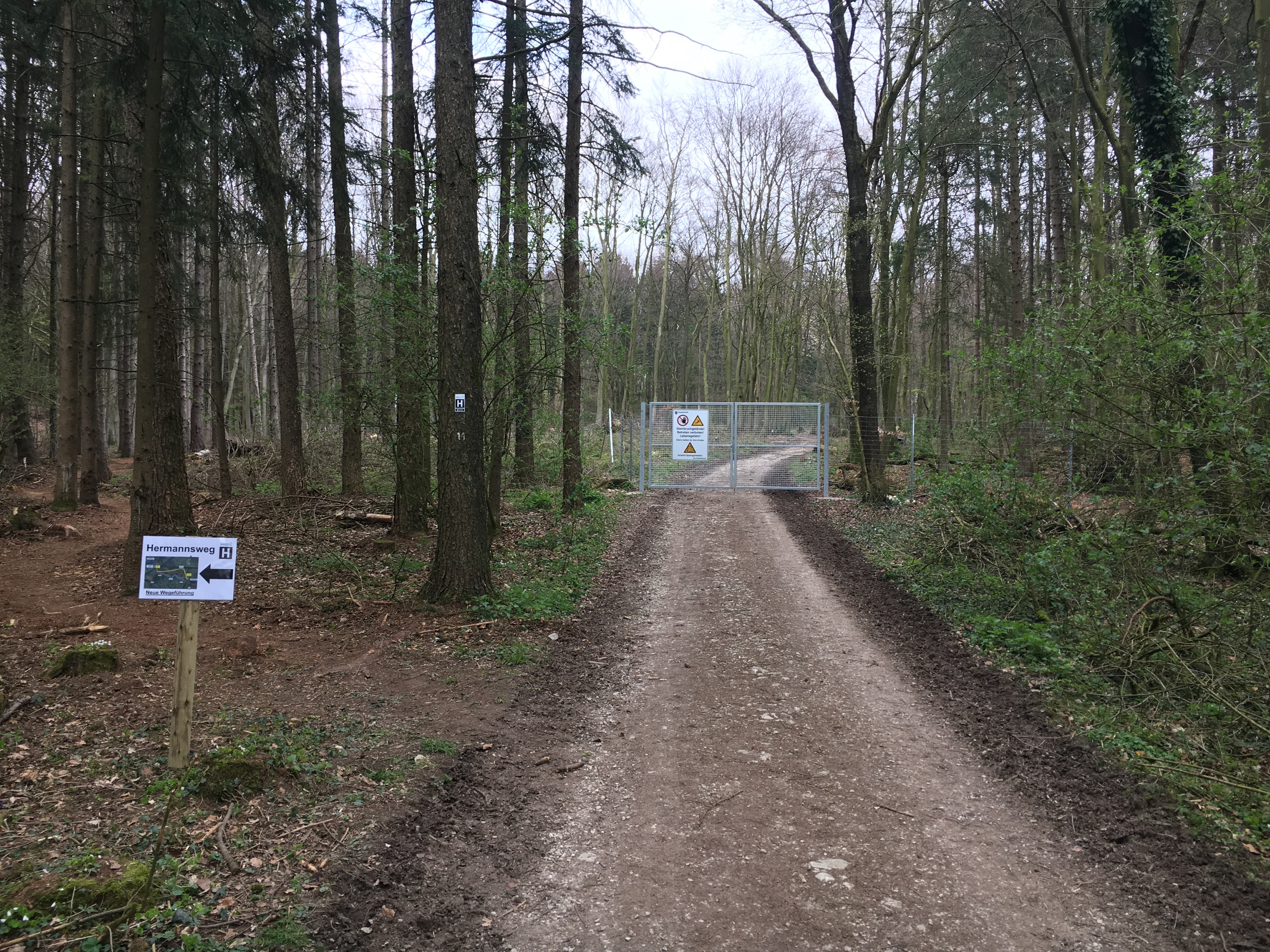 Gesperrter alter Hermannsweg mit Umleitung durch den Wald um den zukünftigen Steinbruch